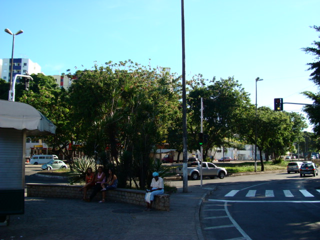 Largo Dois Leões, é um Bairro de Salvador Bahia.